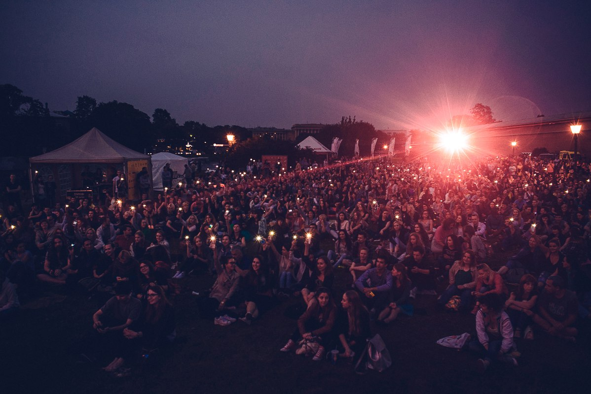 Фестиваль уличного кино в Санкт-Петербурге, 2016